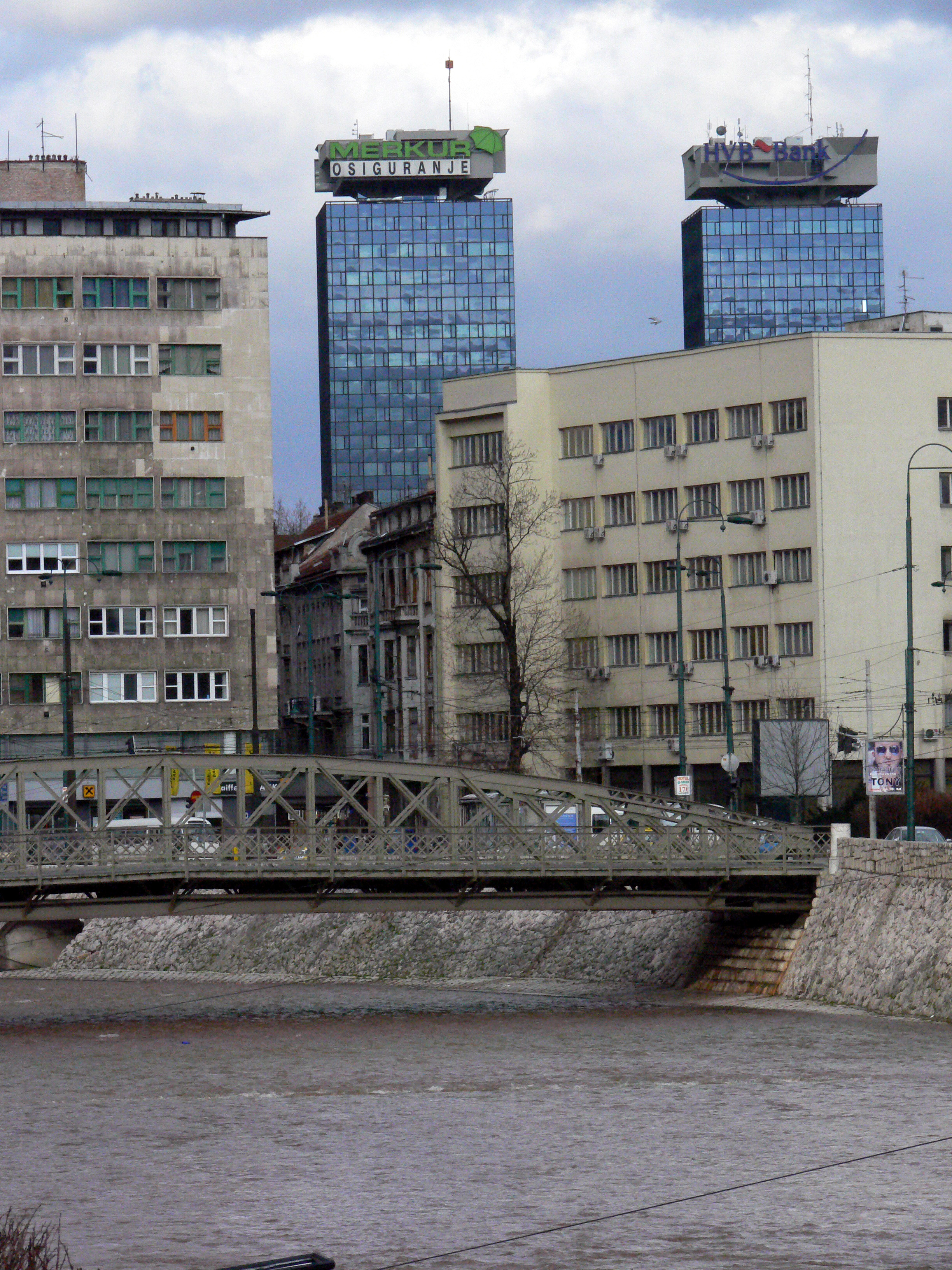 Eiffel bridge, Sarajevo.